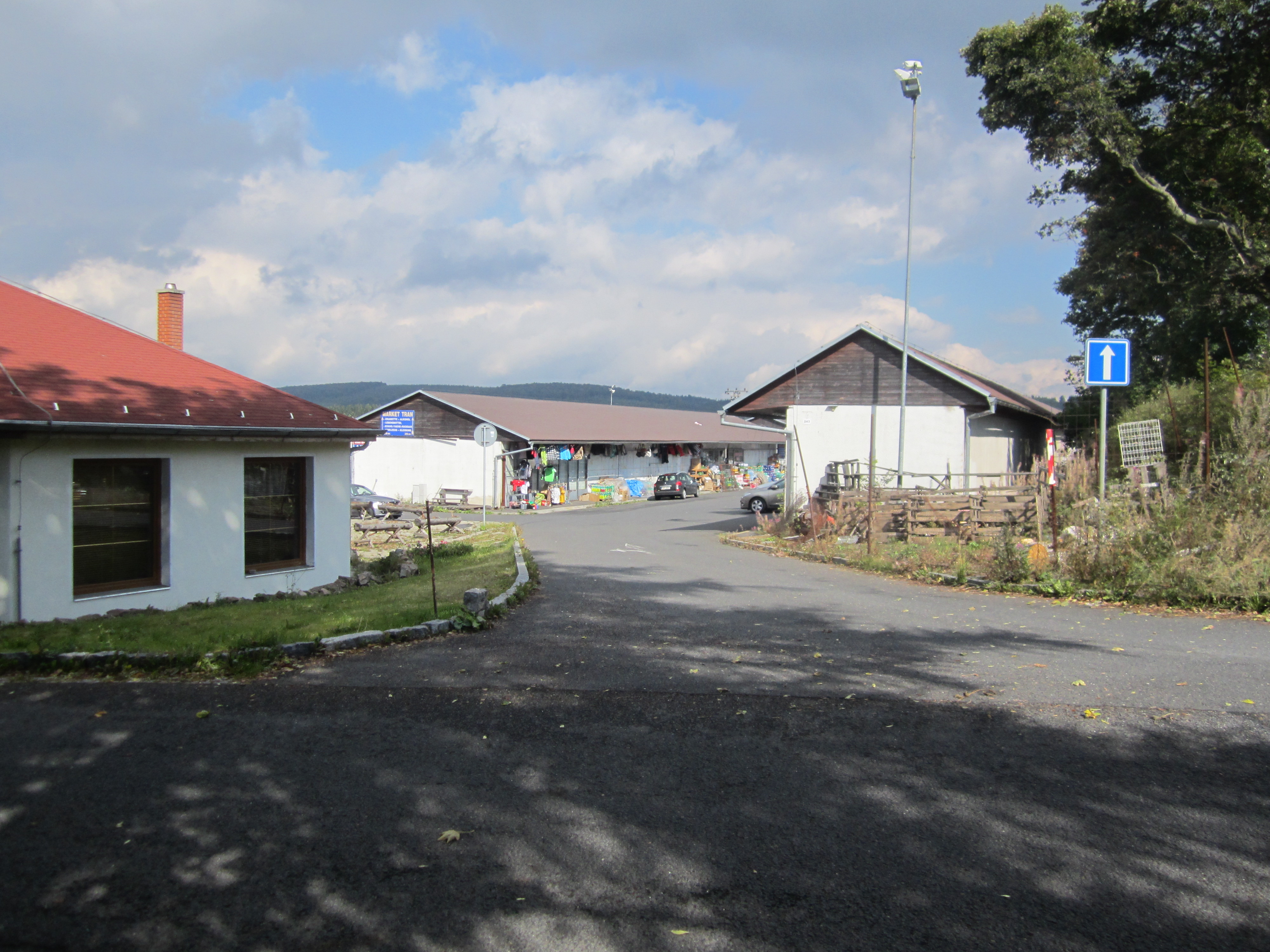 Osada Mníšek - tžnice